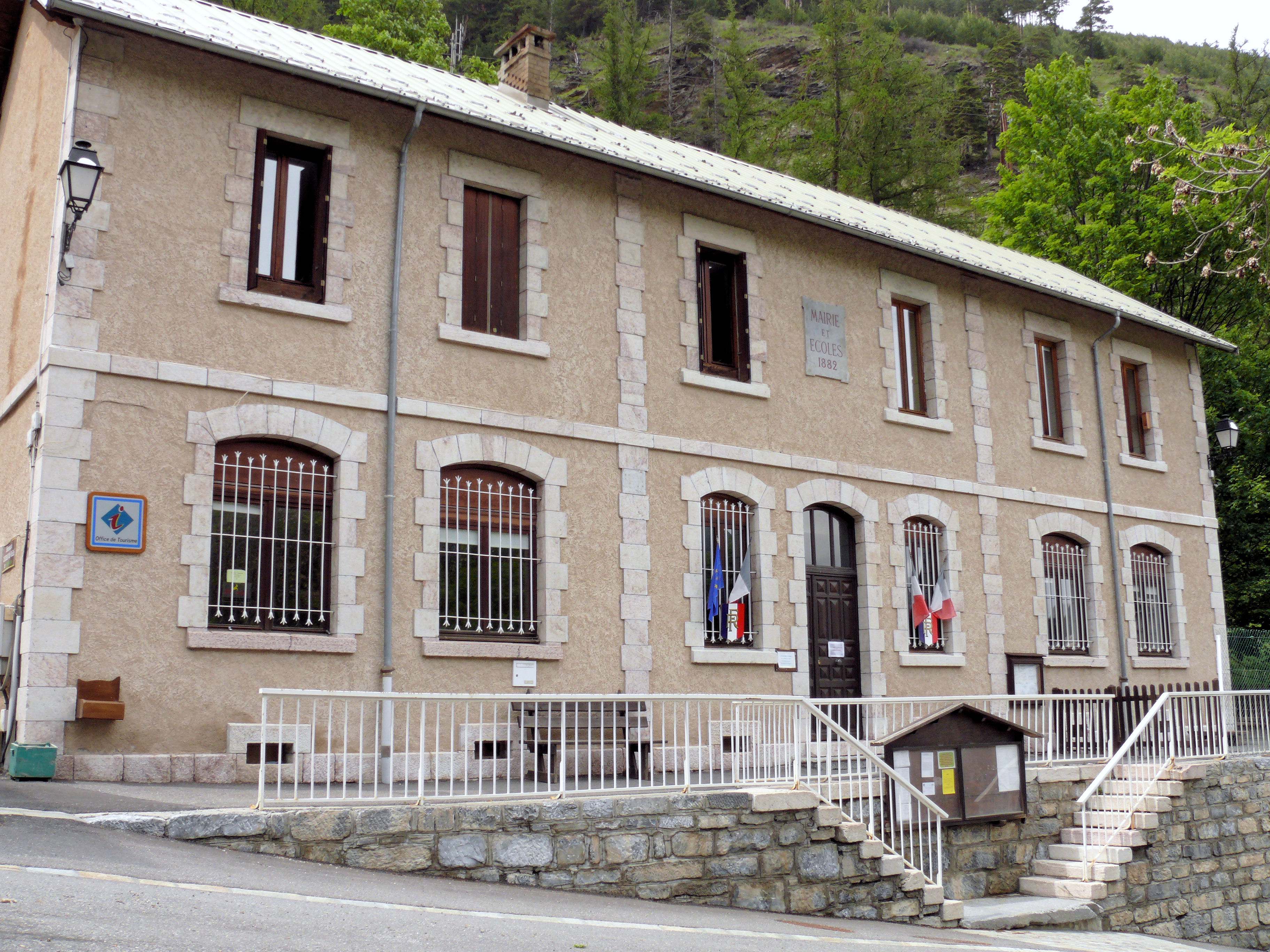 Château-Ville-Vieille - Mairie à Château-Queyras